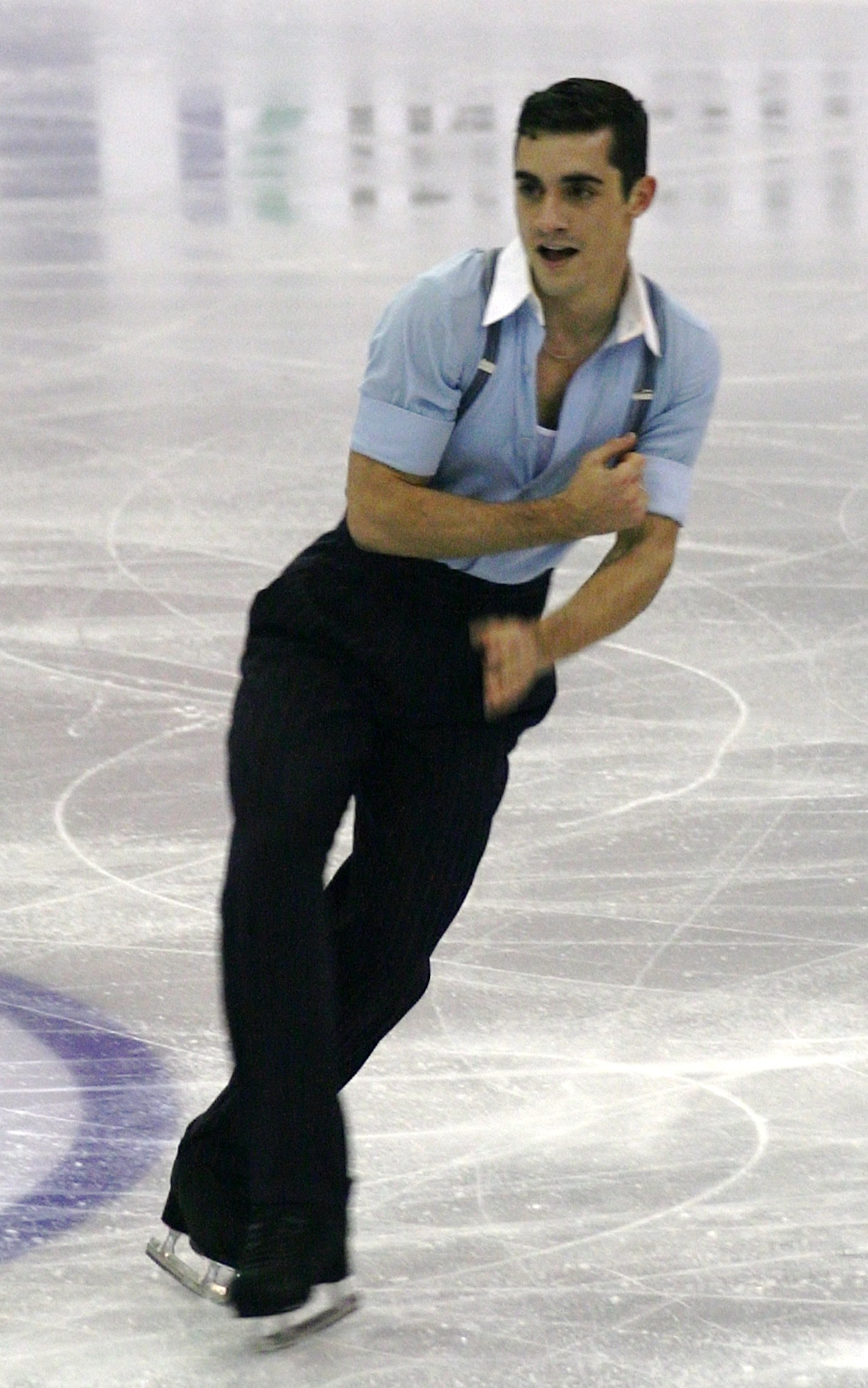 Хавьер Фернандес (Испания) на финале Гран-при по фигурному катанию 2015-2016.